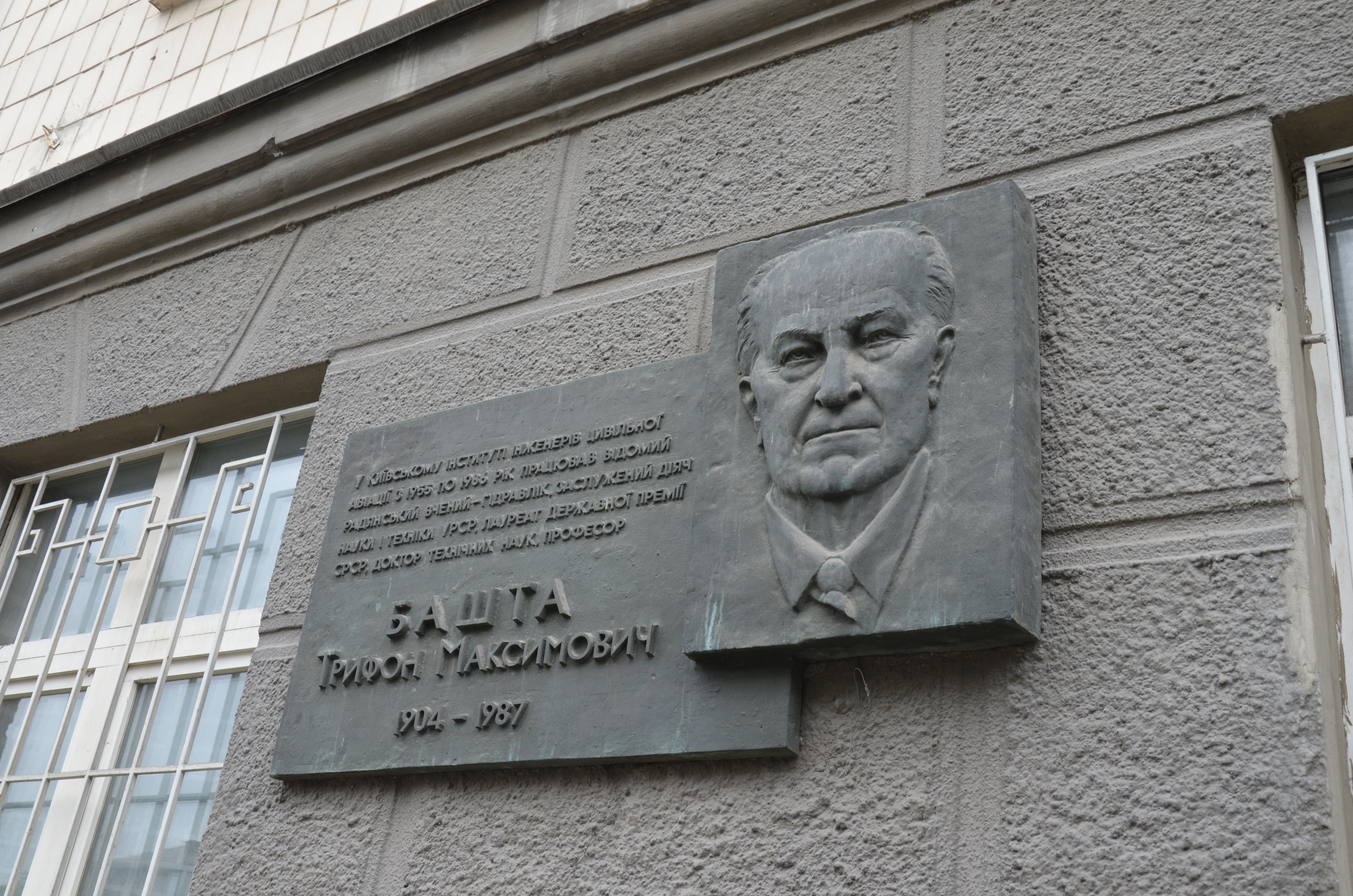 Будинок київського авіаційного інституту, в якому в якому працював В. М. Челомей, вчений у галузі механіки, академік; навчалися та працювали відомі вчені науки і техніки, Київ, Комарова Космонавта пр-т, 1